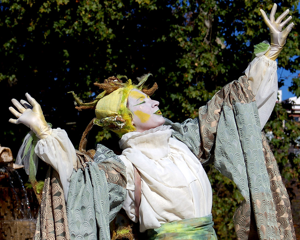 Mimo en la calles